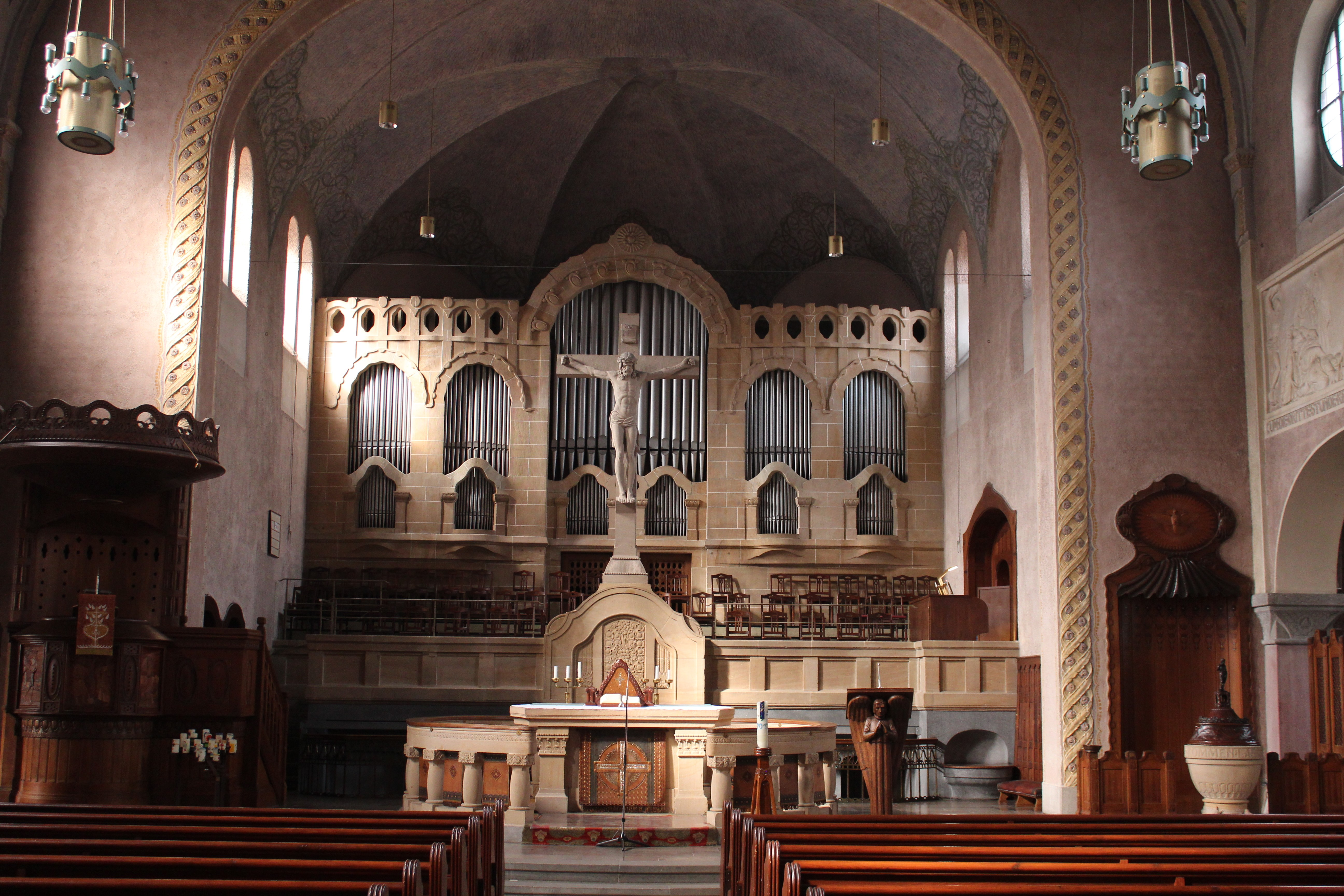 Orgel Markuskirche Stuttgart frontal